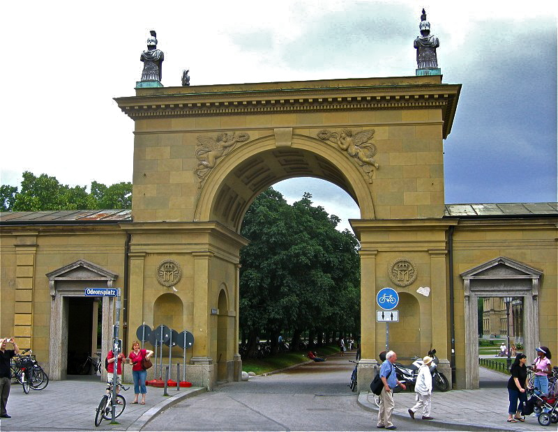 Hofgartentor Odeonsplatz München